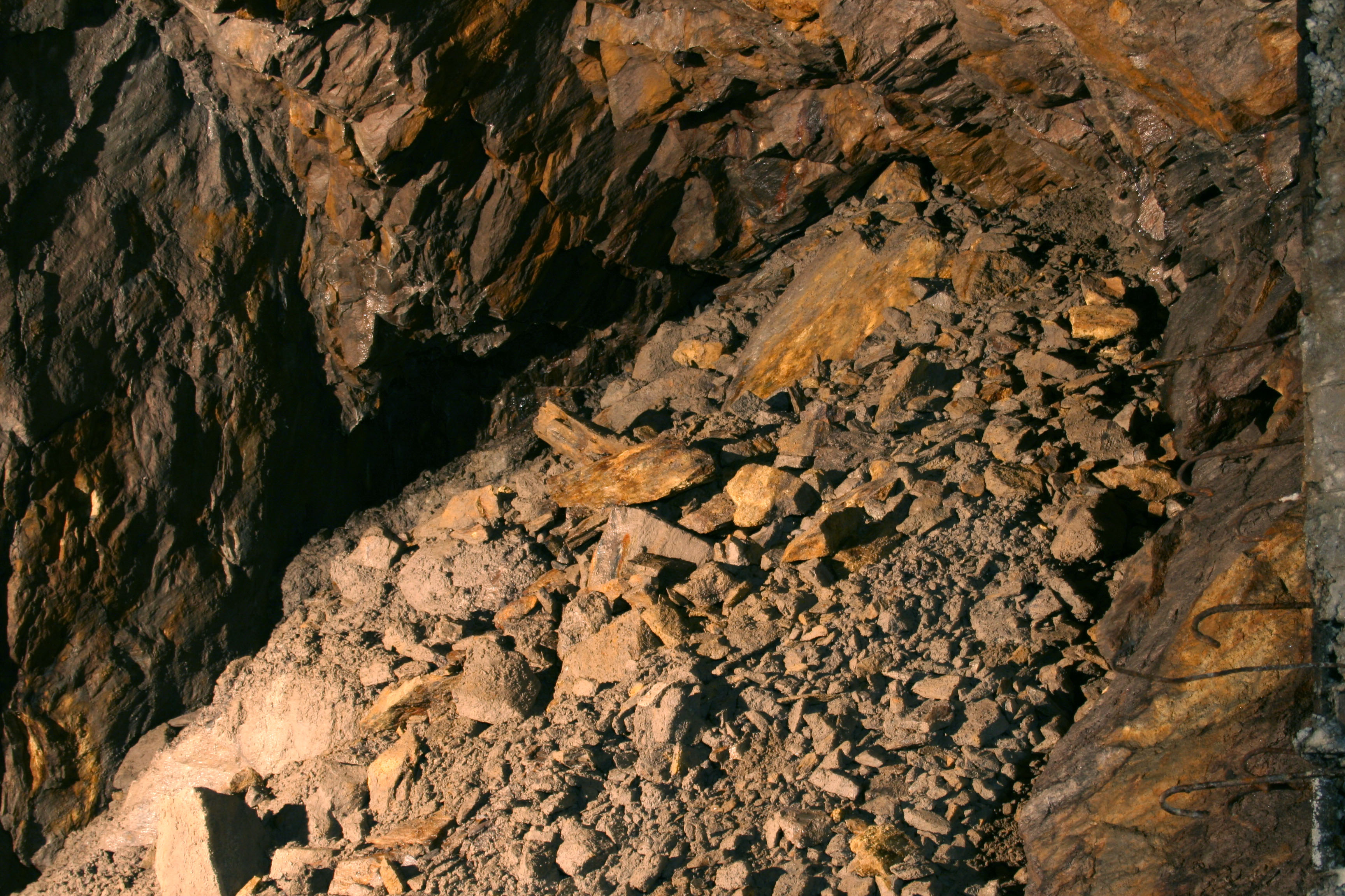 Kompleks Riese w Górach Sowich, Walim - Rzeczka, zawalone przejście, prowadzące prawdopodobnie do szybu